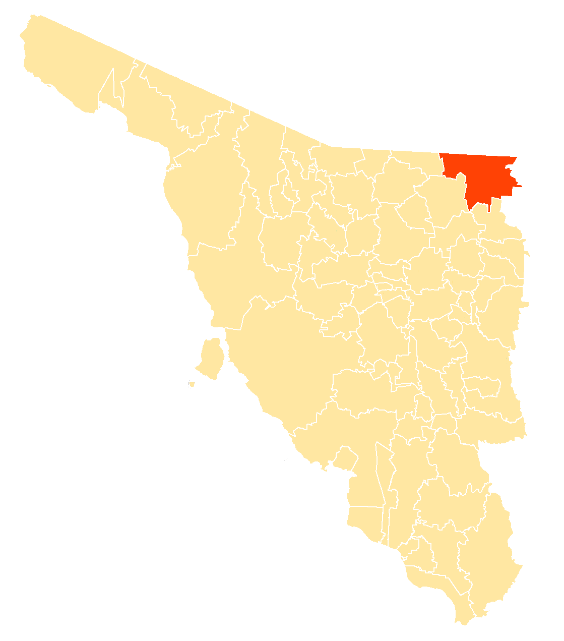 Municipio dentro de Sonora, México.